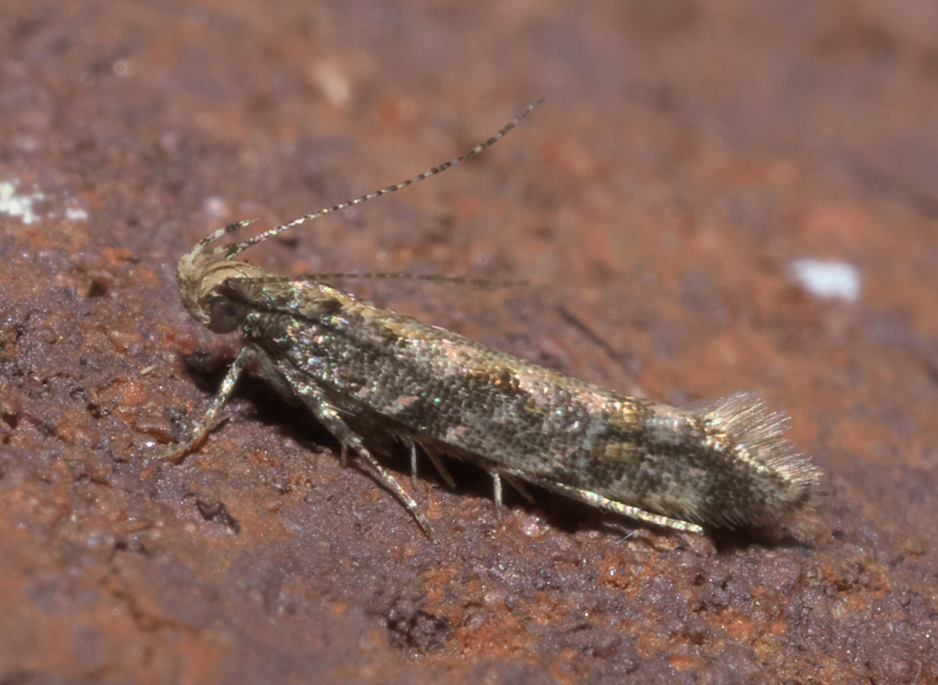 Aristotelia rubidella, Hodges #1762, Size: 5 mm, ID Confidence: 88